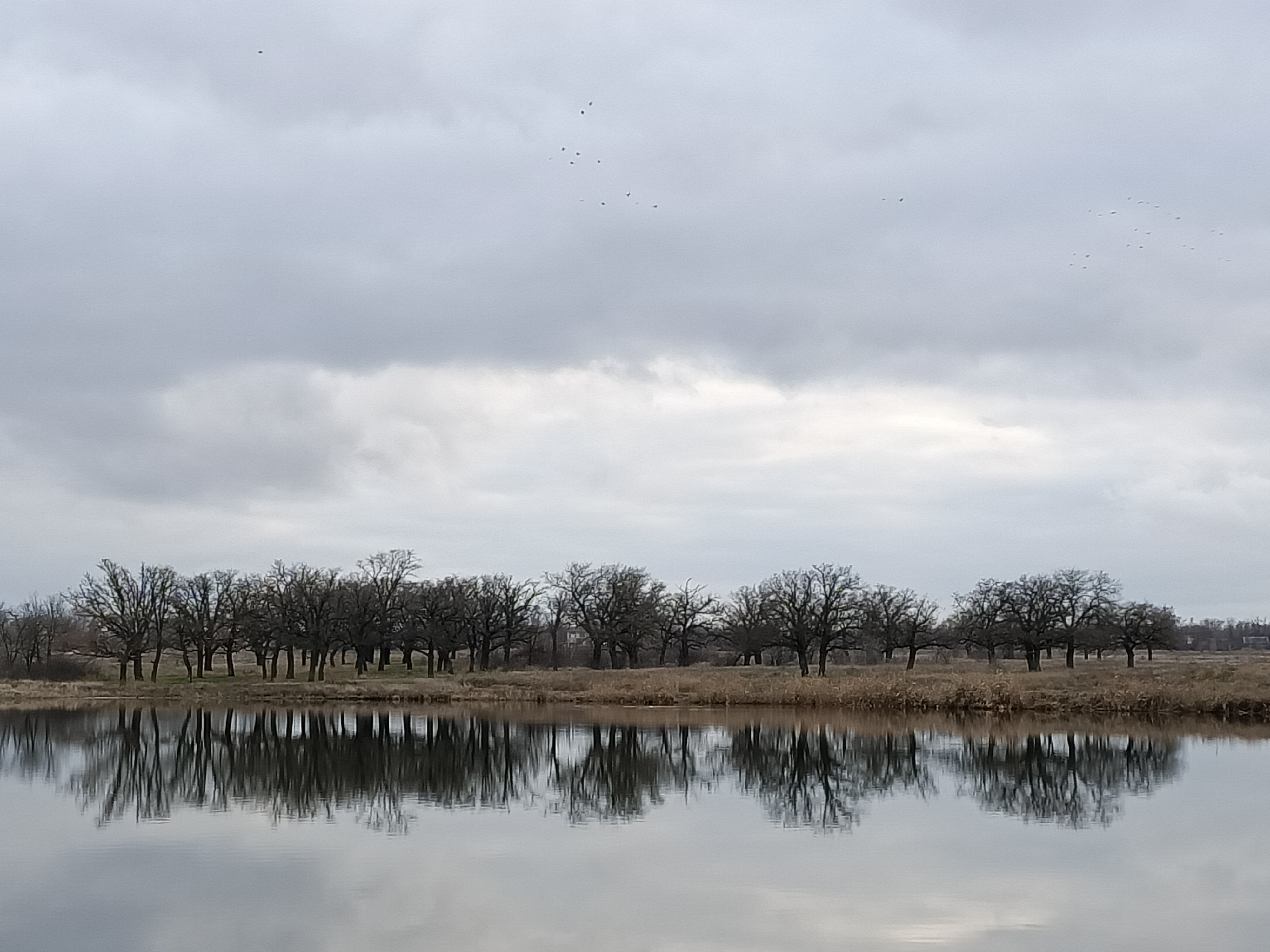 Городской пейзаж с видом на пруд и дубовую рощу, осень